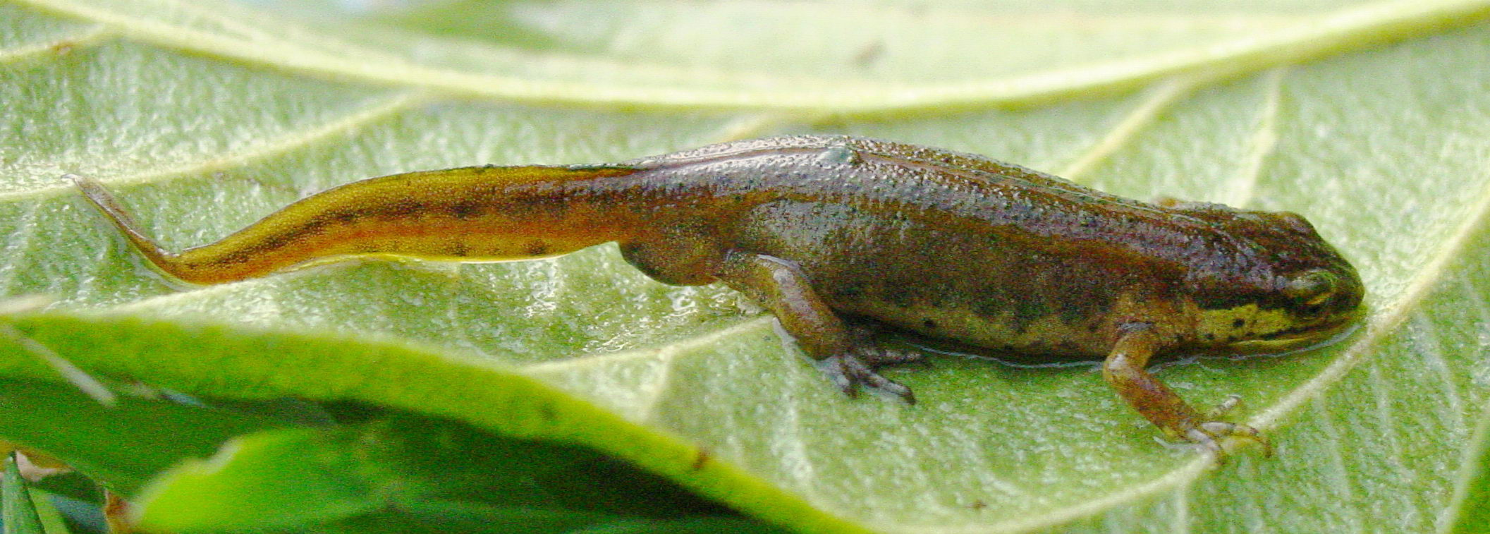 self made. Mandaio - Cesuras - Galicia - Spain Tritón, Tritón